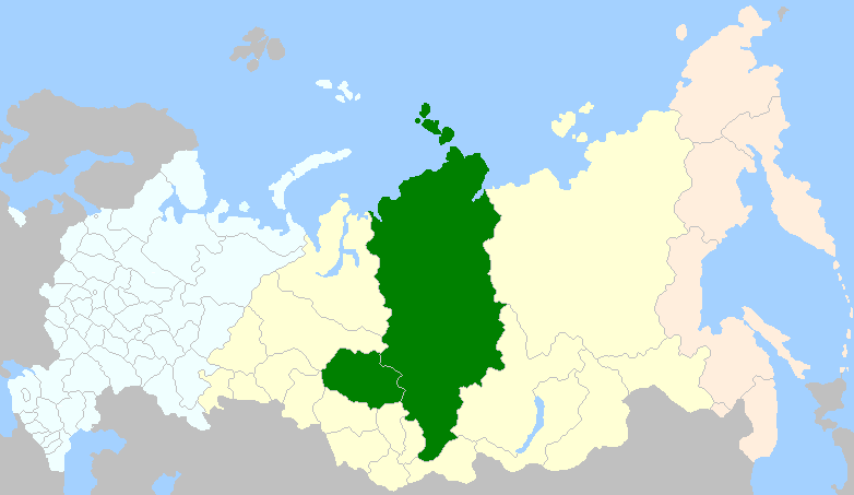 régions administratives occupées en 2008 par les Tchoulymes